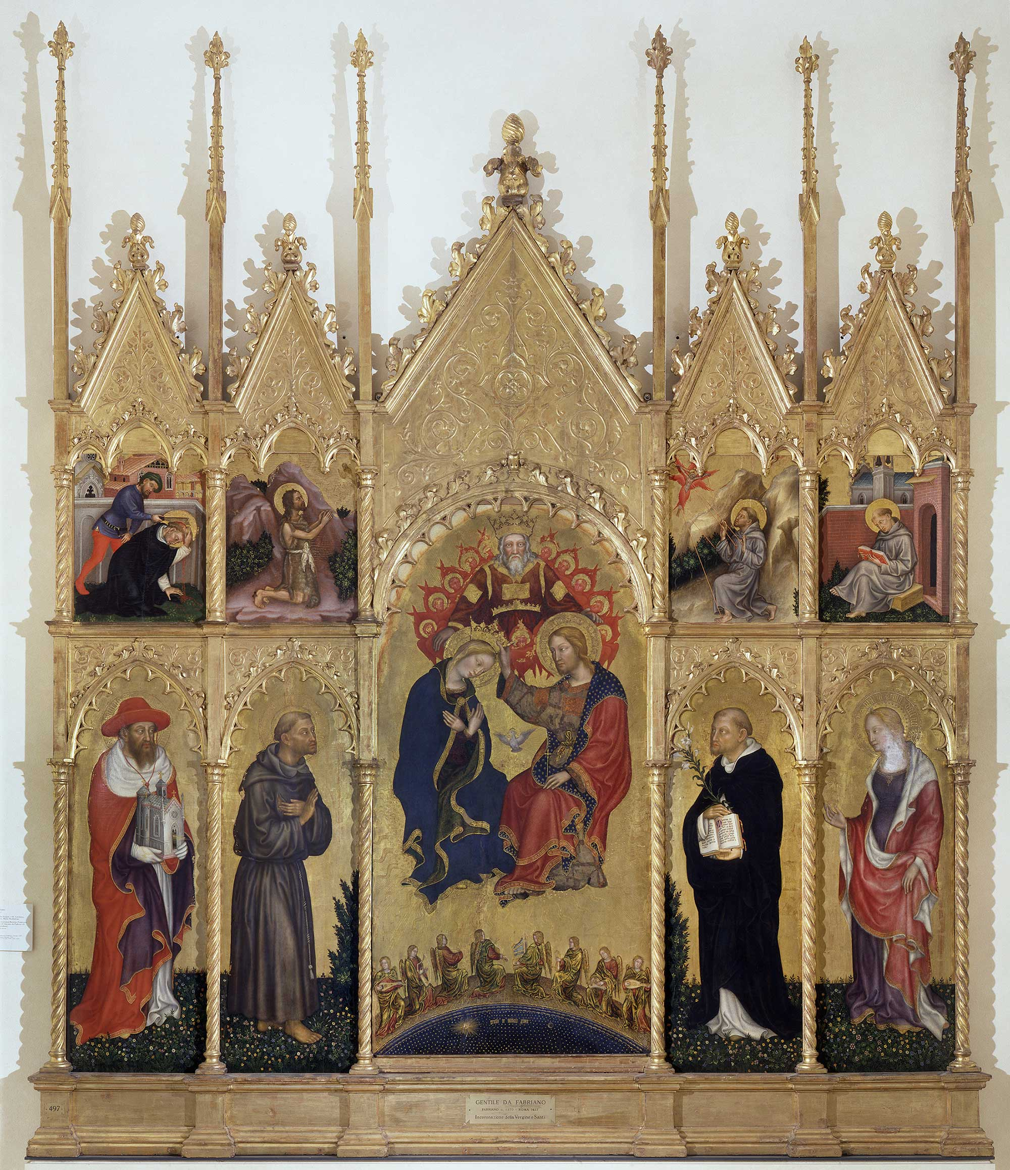 Gesamtansicht